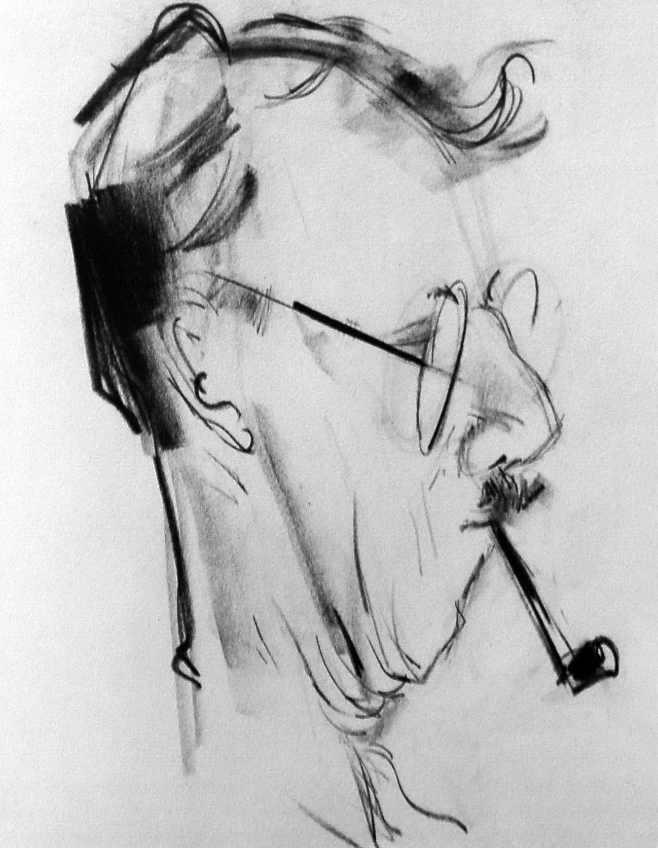 Sigge Bergström. Karikatyrteckning av konstnärsvänner utförd av konstnären John Jon-And, utgiven postumt efter hans död 1941 i boken Konstnärer Gebers Förlag.